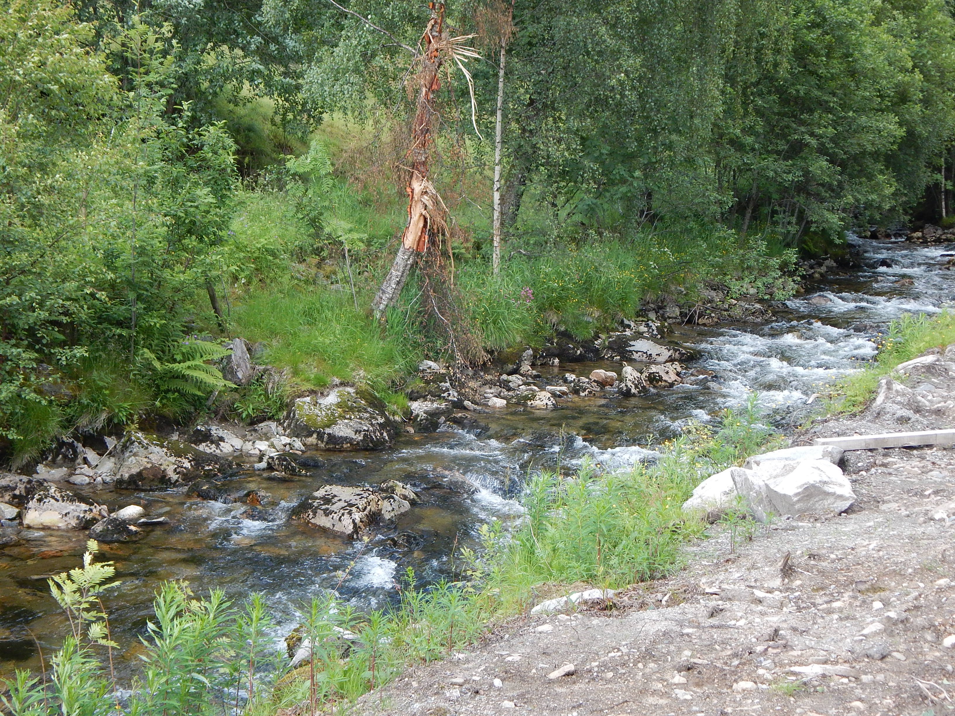 Helgheimselva like ved Helgheim kirke